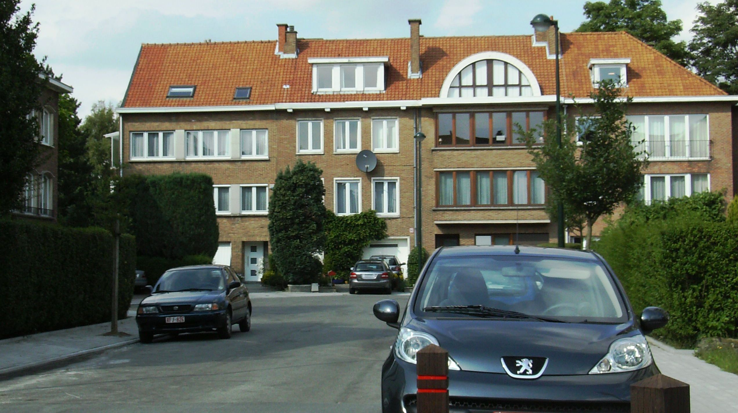 avenue Lamey Auderghem Belgium